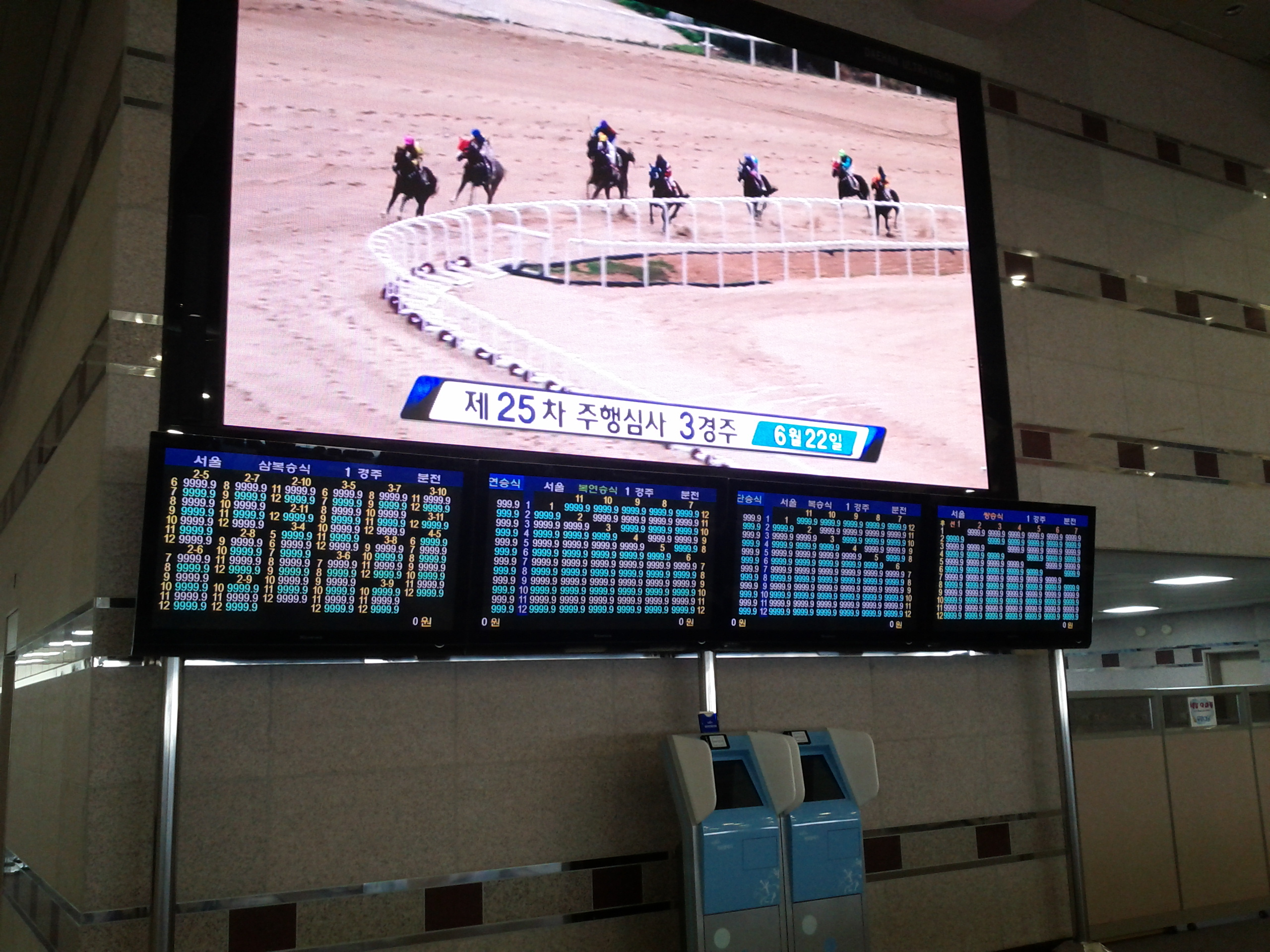 서울경마공원 회원 전용실